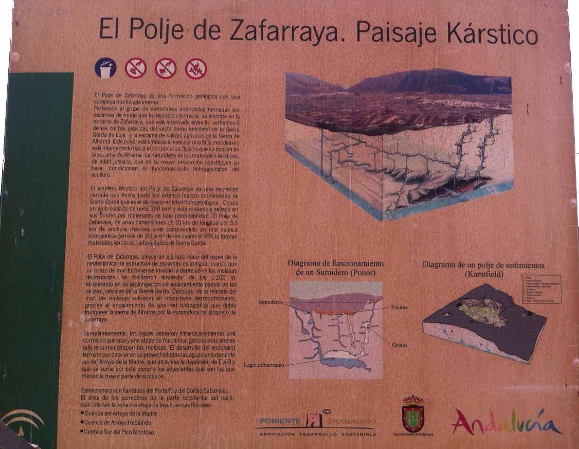 Panel descriptivo del Polje de Zafarraya, Granada.